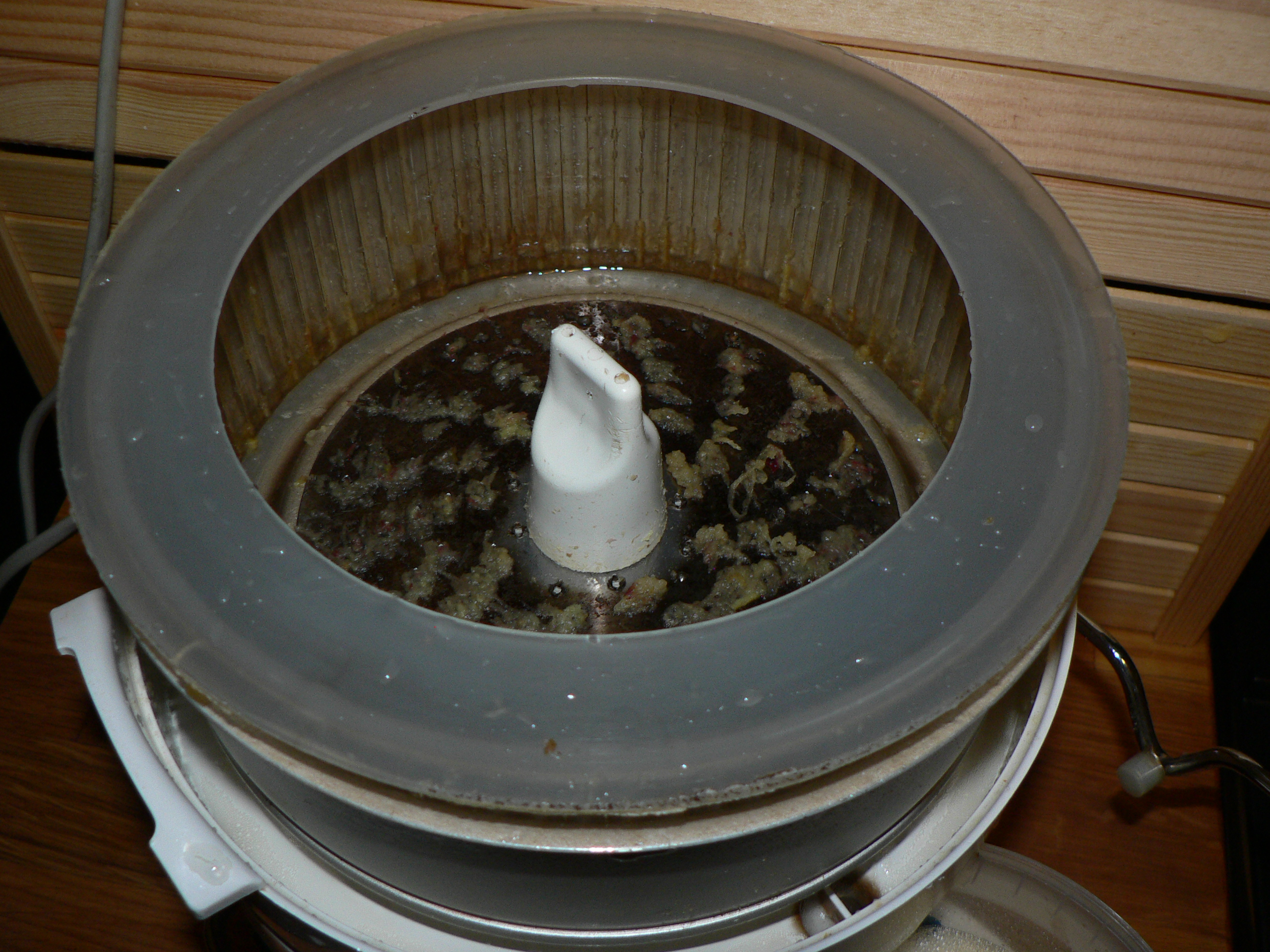 juice centrifuge